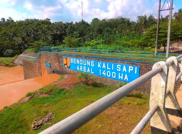 bendung kali sapi